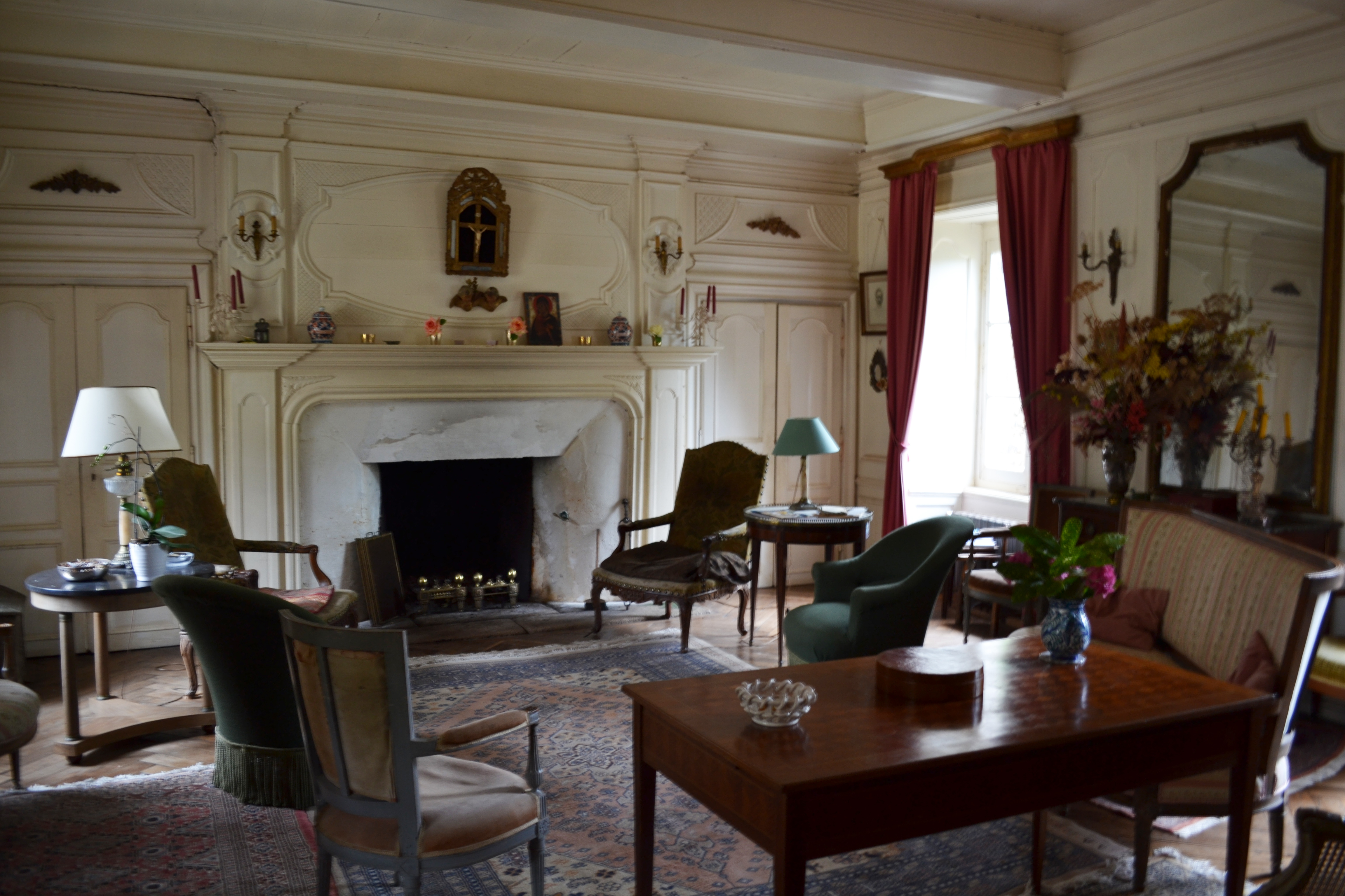 Le Manoir de Tronjoly (monument classé du XVIe siècle) à Cléder dans le Finistère (Bretagne). .